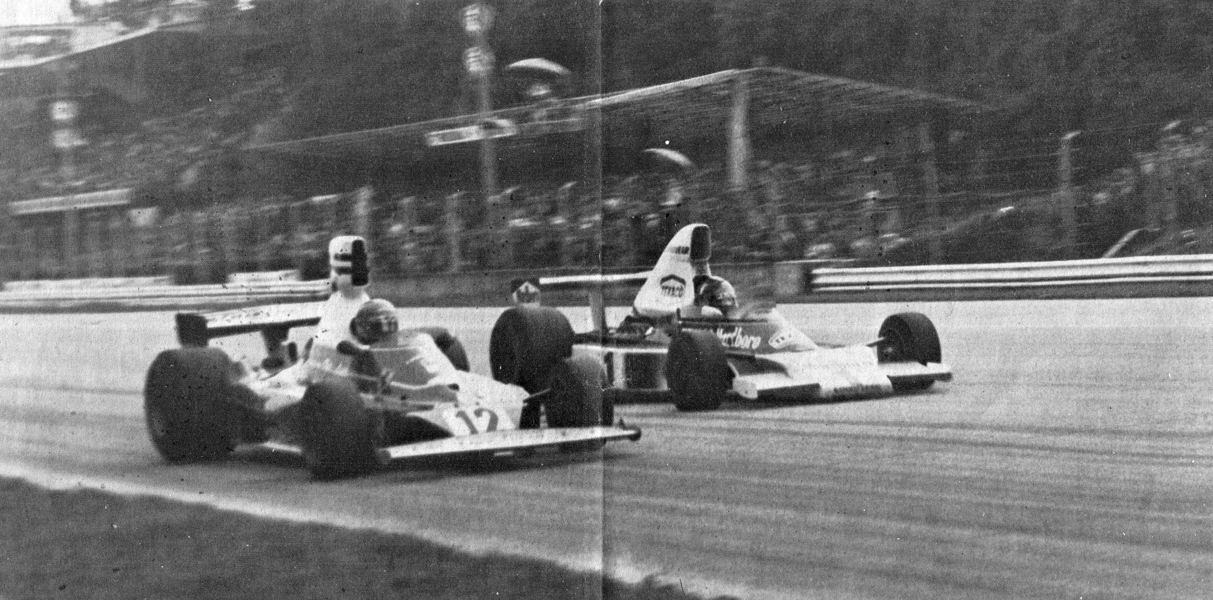 Monza, Autodromo Nazionale, 7 settembre 1975. XLVI Gran Premio d'Italia. Il pilota della Scuderia Ferrari, l'austriaco Niki Lauda (n. 12, in primo piano) su Ferrari 312T, viene superato dal campione del mondo in carica della McLaren, il brasiliano Emerson Fittipaldi (n. 1, in secondo piano) su McLaren-Ford M23C.Original caption: "Uno dei segreti di Niki Lauda è il complesso-Fittipaldi, di cui l'austriaco non ha mai fatto mistero di soffrire. Se n'è avuta una dimostrazione proprio a Monza, quando Niki non ha reagito al sorpasso del brasiliano all'ingresso della chicane, a pochi giri dalla conclusione del suo Gran Premio decisivo per l'iride."